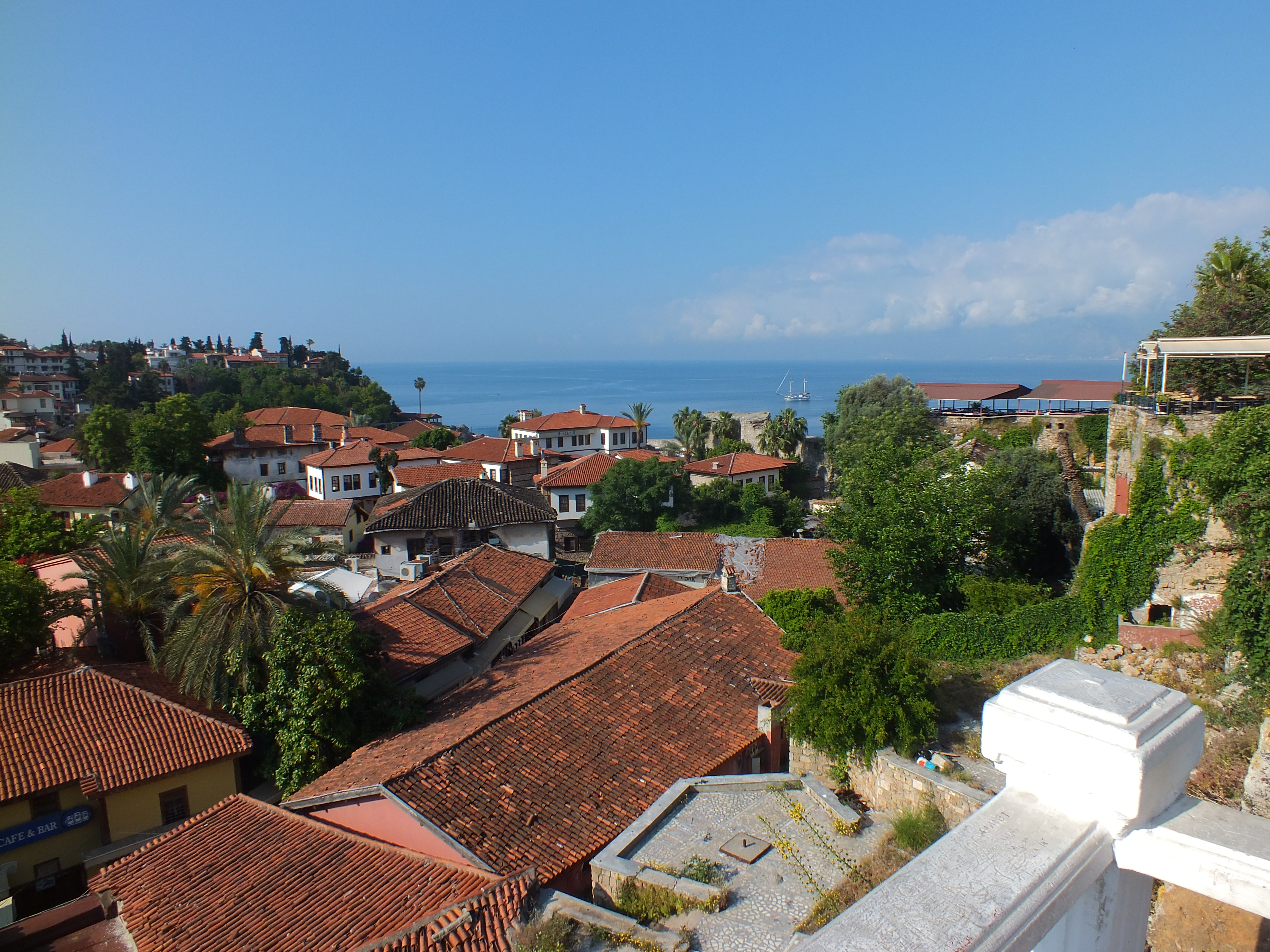 Antalya'nın tarihî merkezi Kaleiçi'nden bir görünüm.